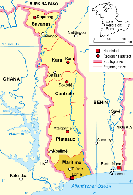 Politische Karte Togos (Region Maritime hervorgehoben)